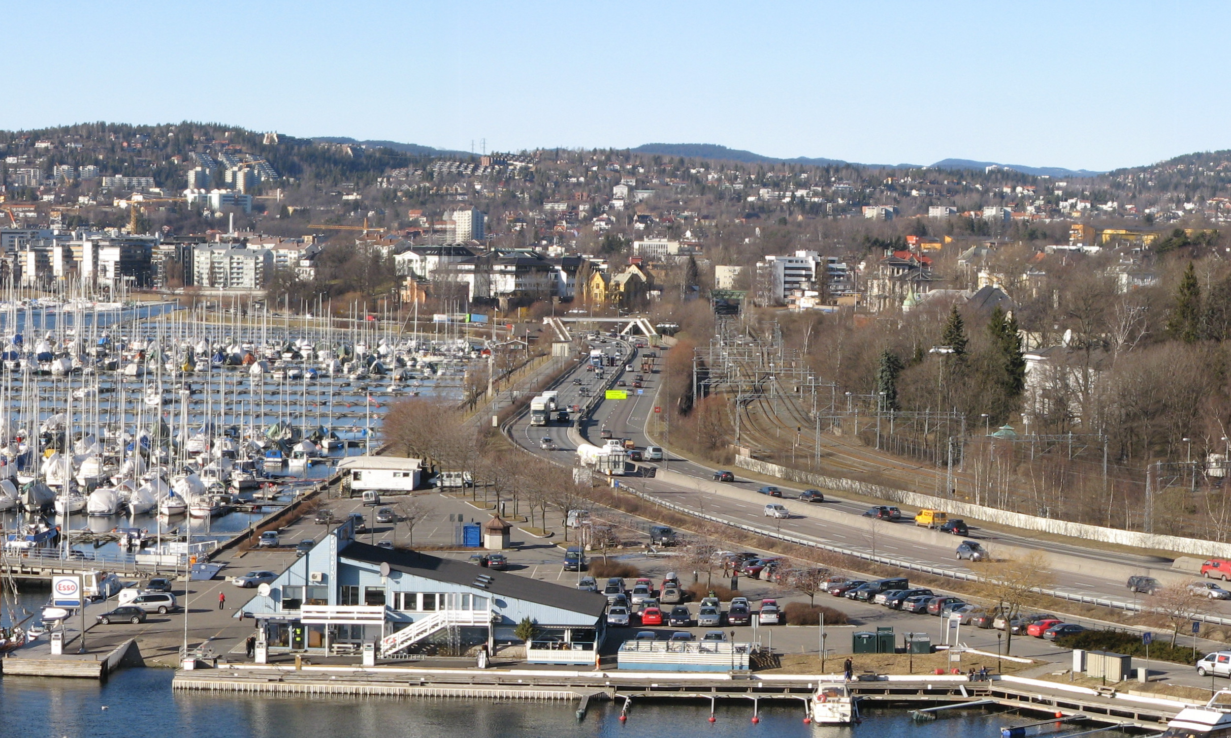 E18 ved Framnes, før Filipstad, Oslo. Lenger bak er Frognerstranda på Skarpsno